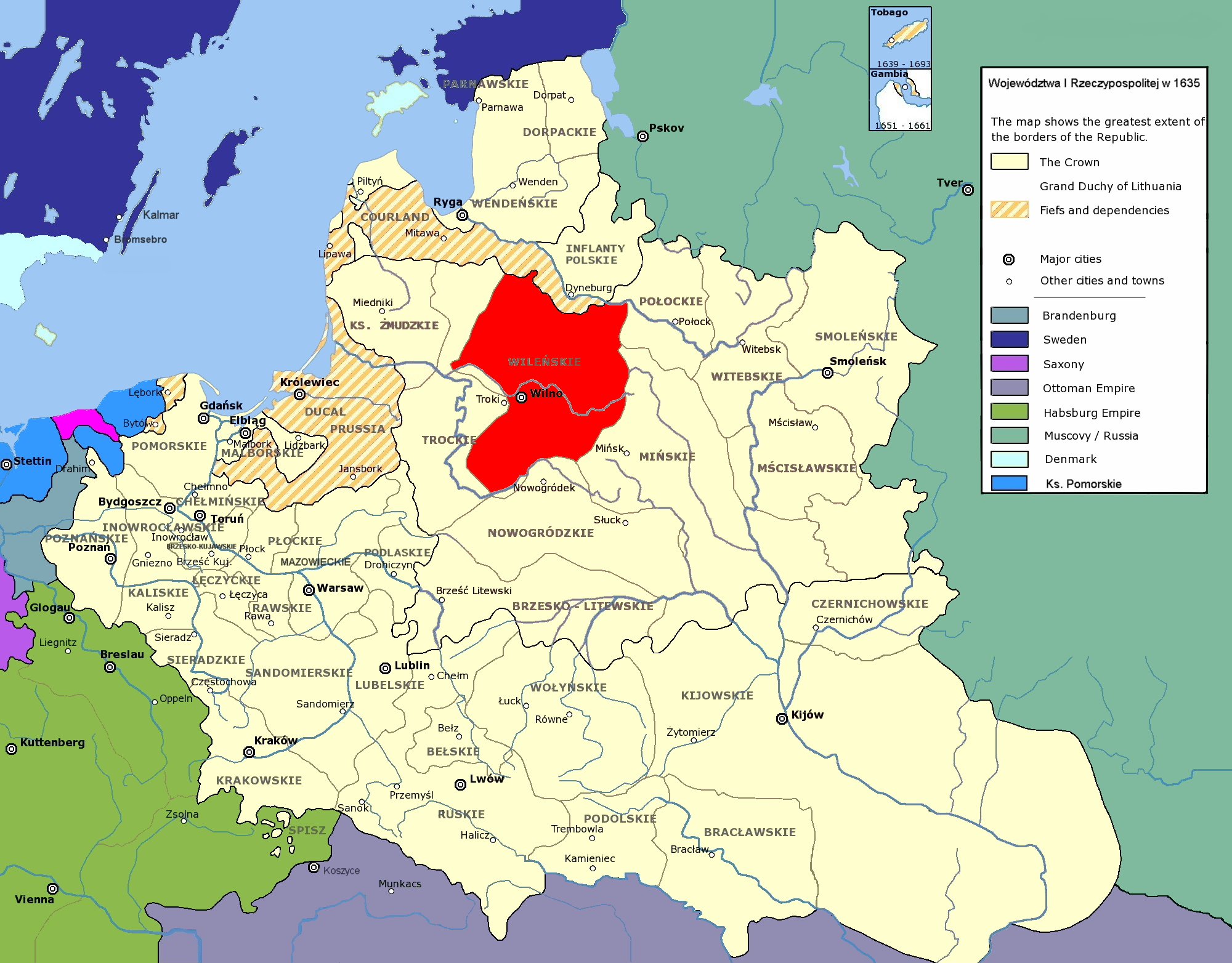 Rzeczpospolita Obojga Narodów w 1635 r.; województwo wileńskie Polish-Lithuanian Commonwealth in 1635; Wilno Voivodeship